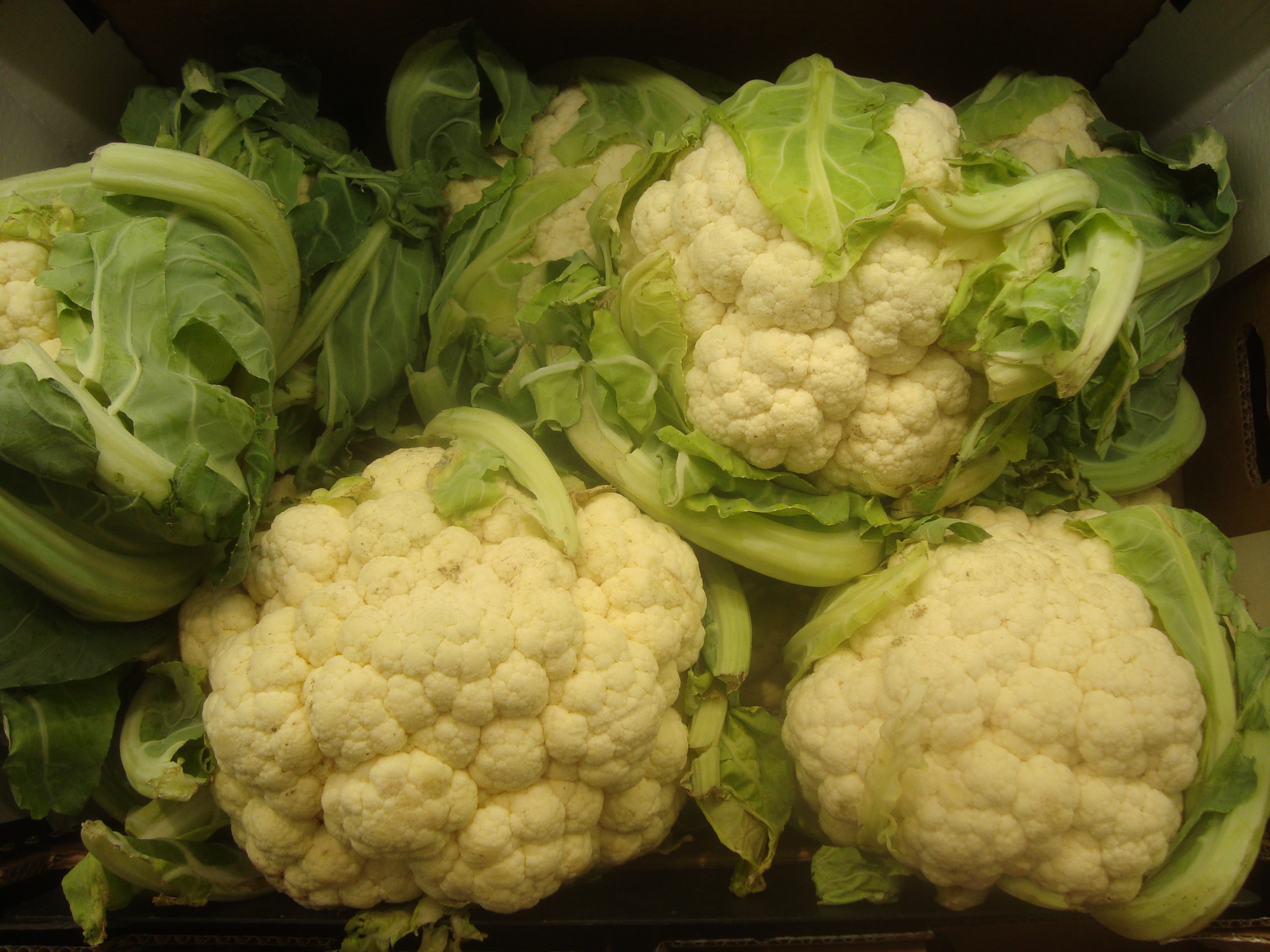 Coliflores blancas de la huerta de Valencia.